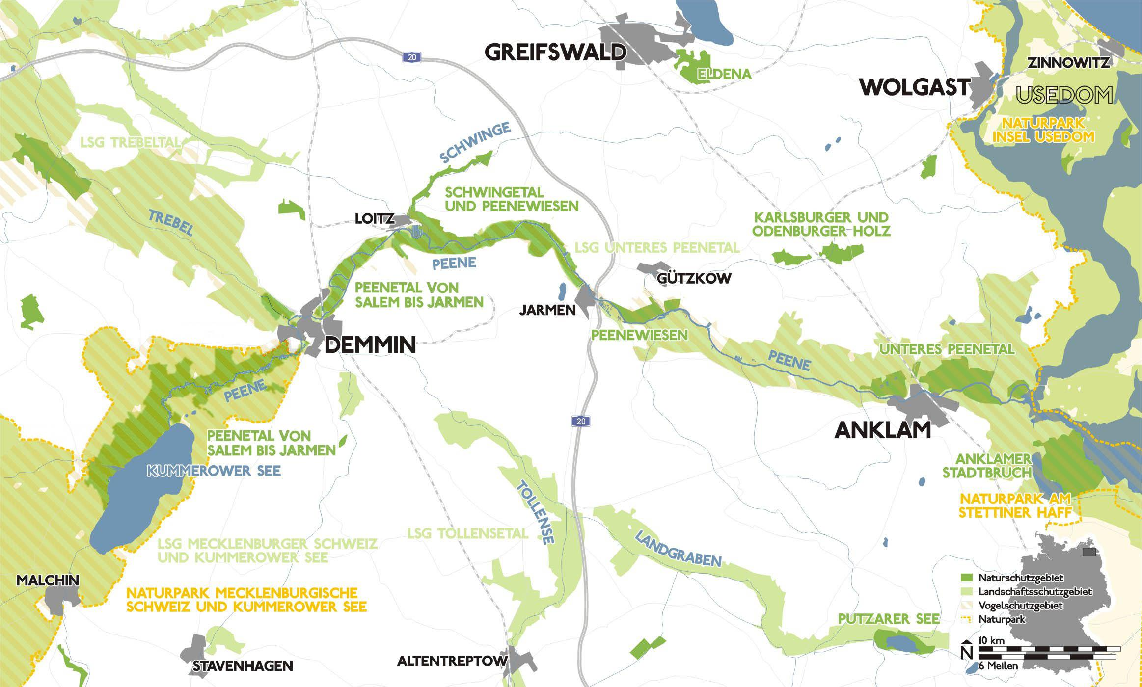 Karte des Peenetals mit Schutzgebieten